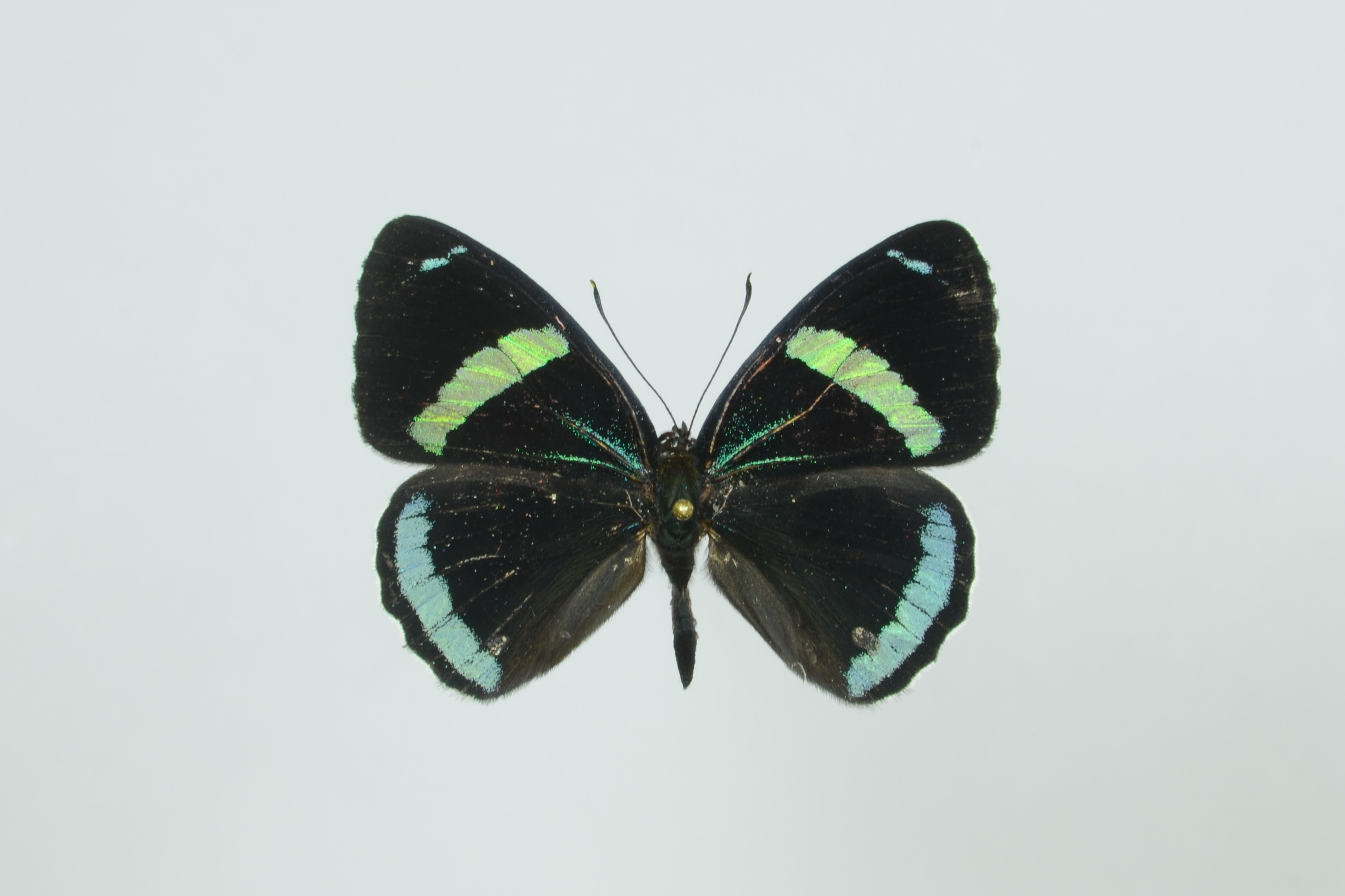 Diaethria clymena dorsal. Rio Napo, Orellana Province, Ecuador